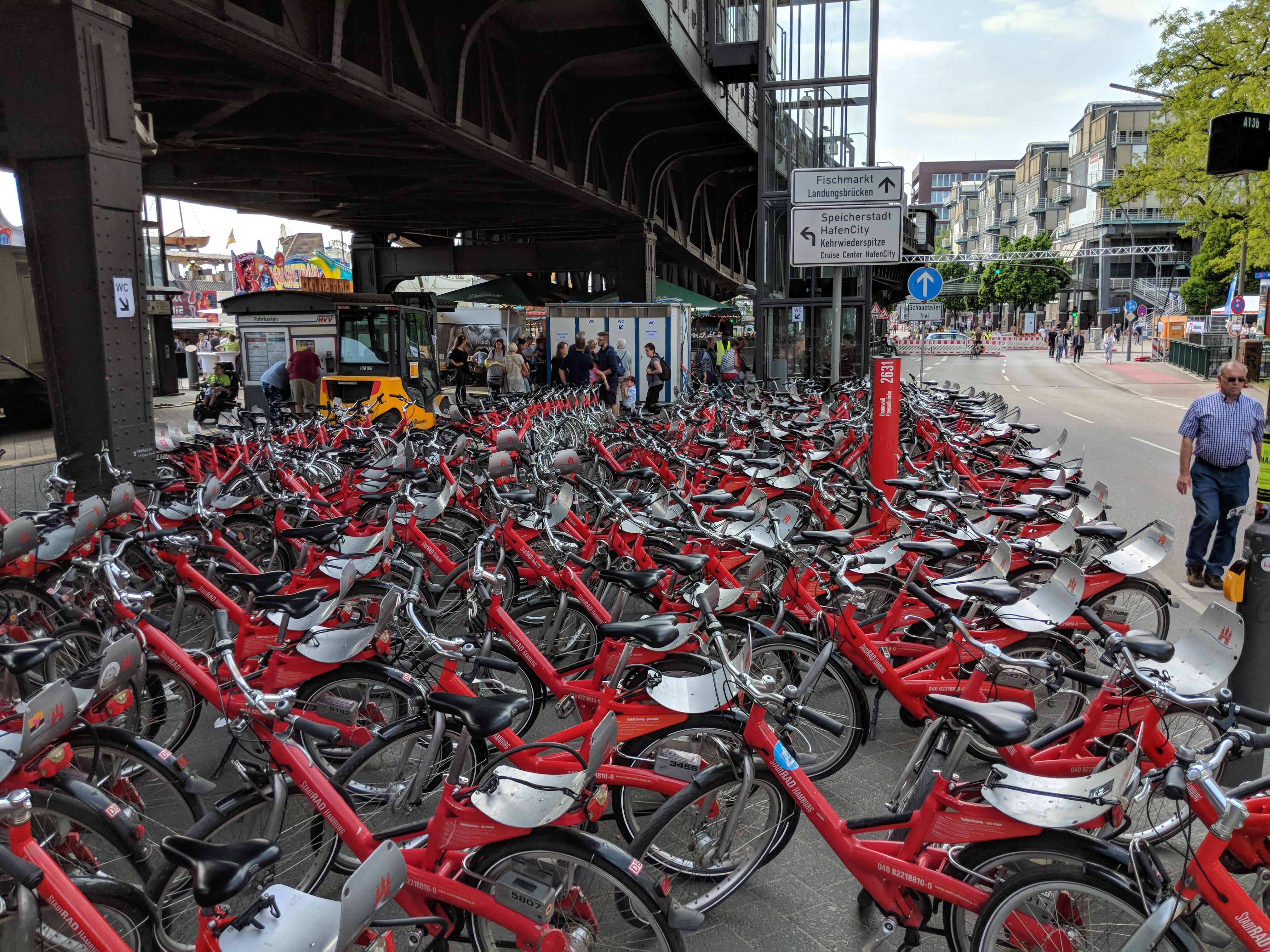 Die Stadtrad Station Baumwall beim Hafengeburtstag 2018